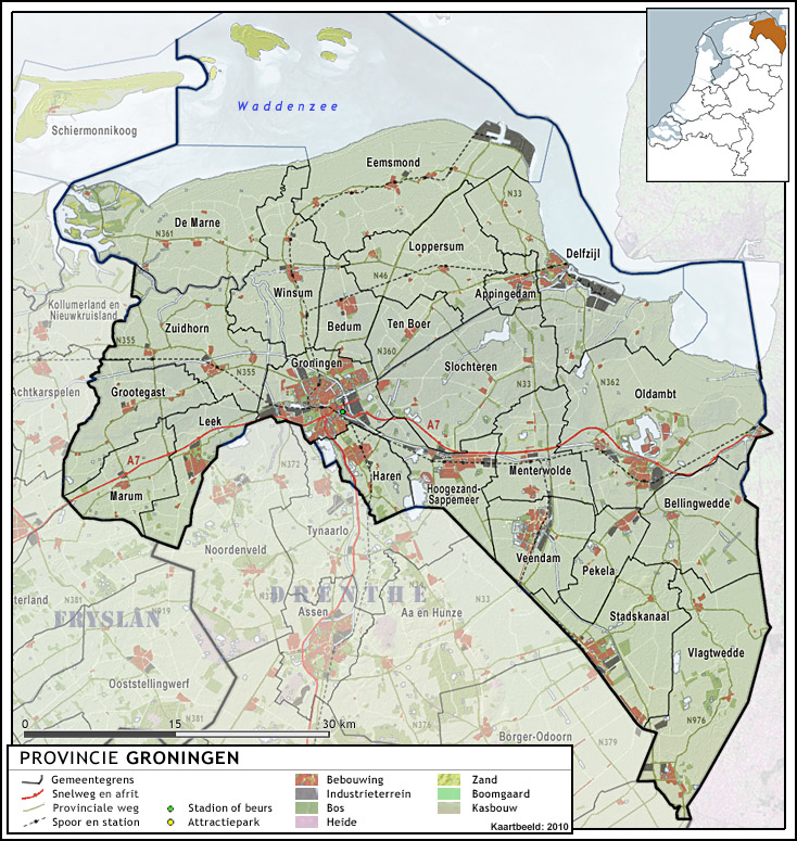 Provincie Groningen, impressie van het landschap en bestuurlijke gemeentegrenzen per 2010. Door Jan-Willem van Aalst, samengesteld uit publiek beschikbare geo-data: Referentie-ondergrond (kustlijn, steden, wegen) gerasterd uit de OpenStreet Map OSM. ( Inhoud is beschikbaar onder de Creative Commons Attribution-ShareAlike 3.0 license. Referentie-ondergrond op water bewerkt vanuit Gebruik is vrij met bronvermelding NLR en ESA. Vectorgrenzen van gemeenten en regio's vrij ter beschikking gesteld met dank aan cartografen van brandweerregio's Hollands-Midden en IJsselland; gerasterd in Photoshop. Hoogte-aanduidingen (reliëf) gerasterd uit de AHN Viewer ( gebruik is vrij met bronvermelding (c) AHN, Overige kenmerken op de kaart: eigen tekenwerk van Jan-Willem van Aalst, op basis van gerasterde gemeentegrenzen.